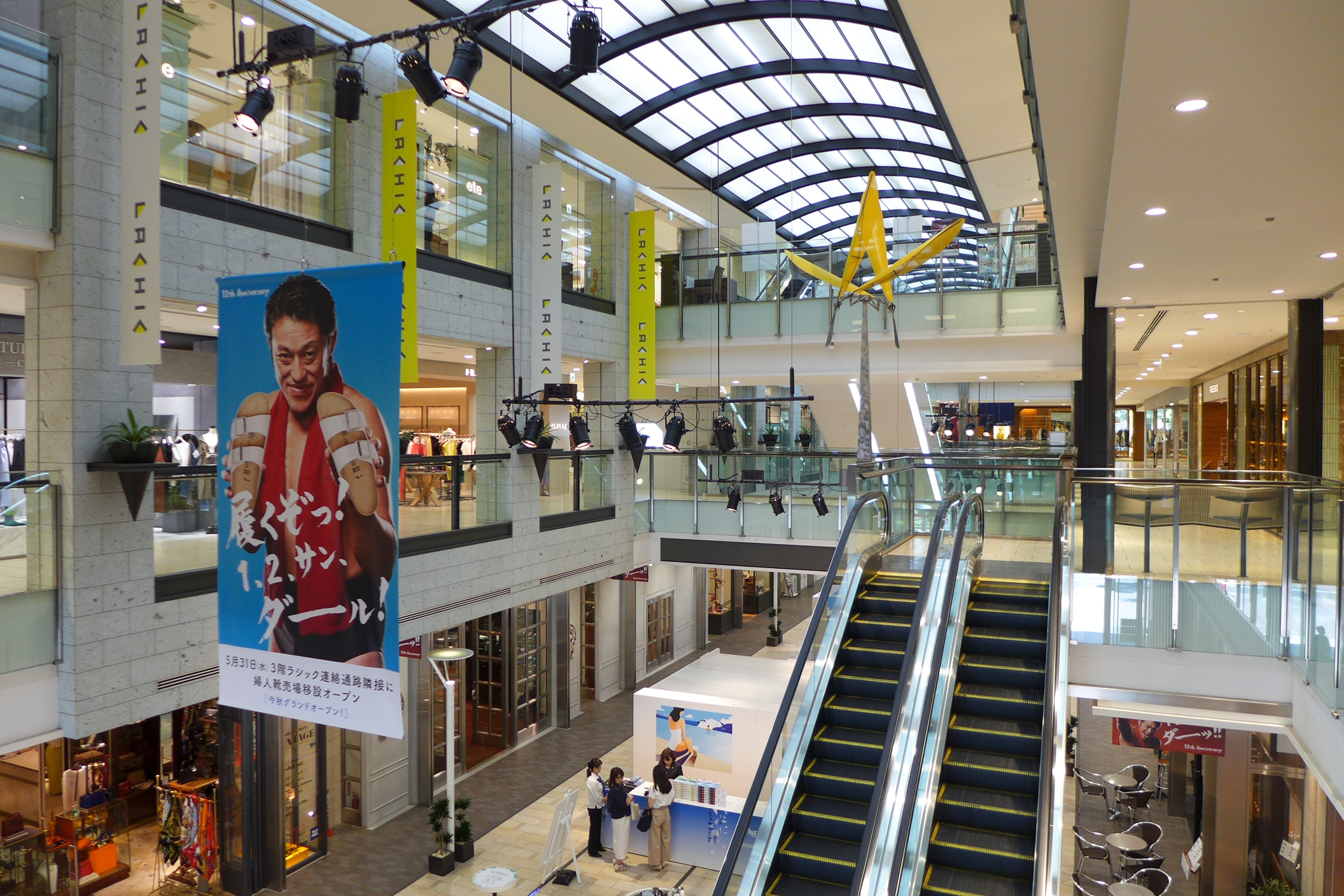 LACHIC